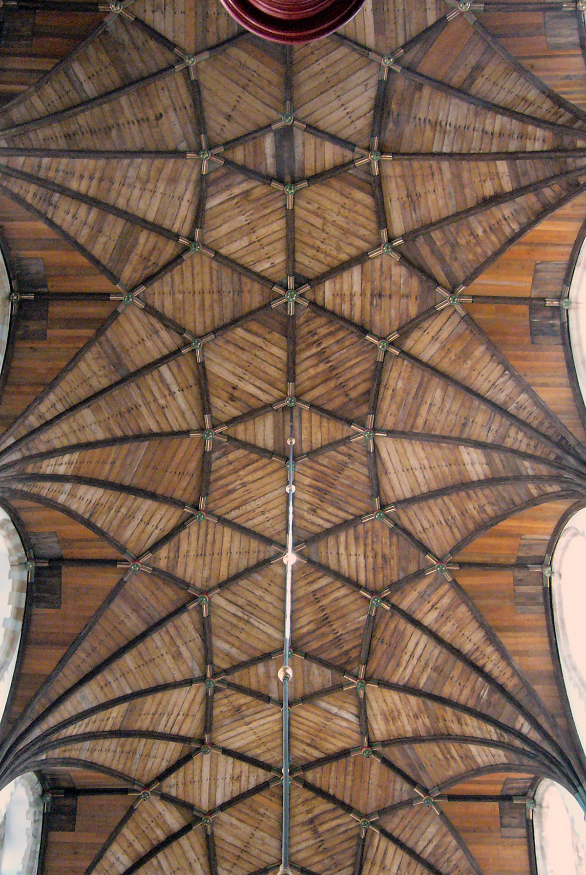 houten stergewelf St Bavo te Haarlem